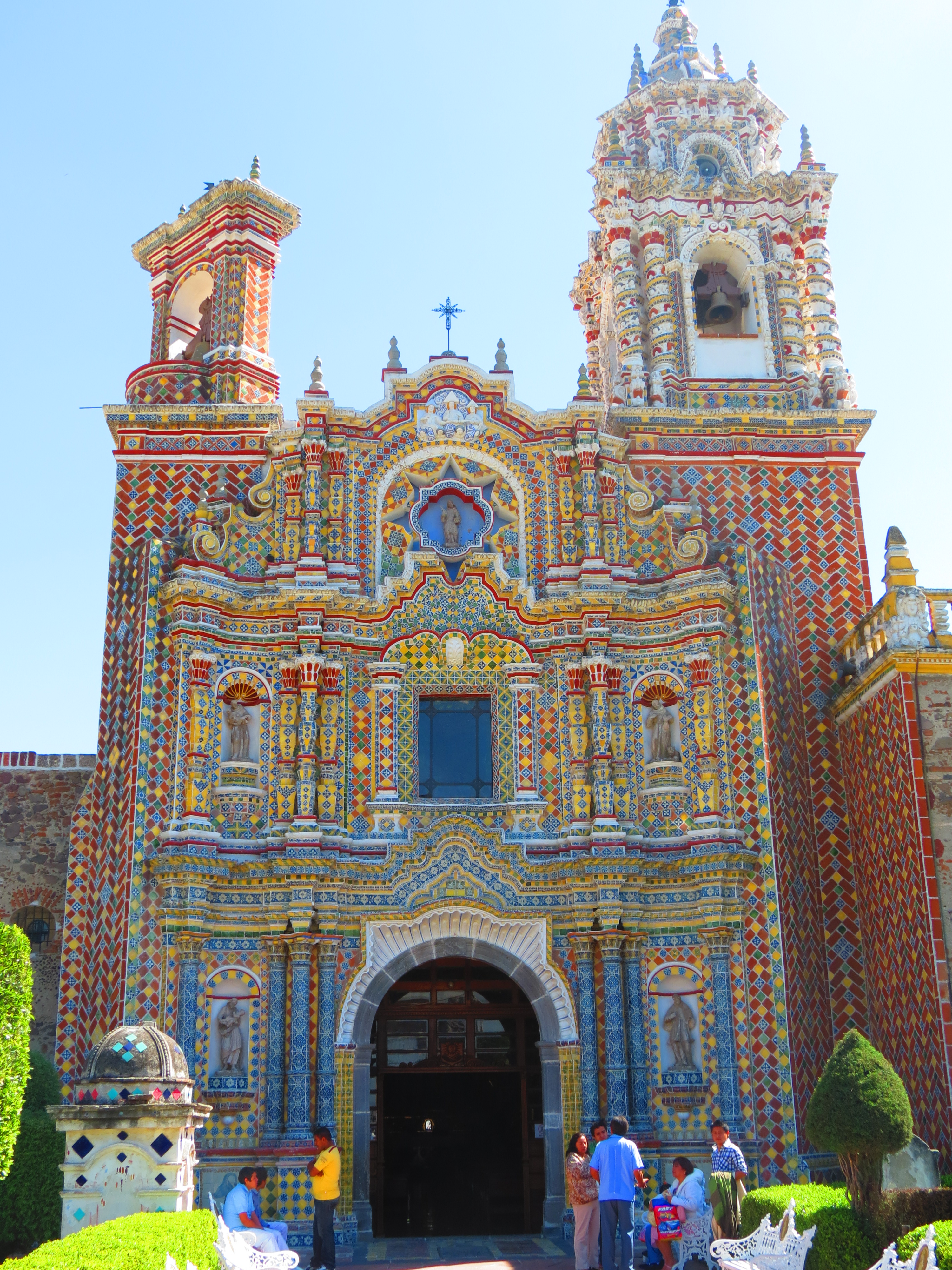 Vista de la Fachada del Templo de San Francisco Acatepec